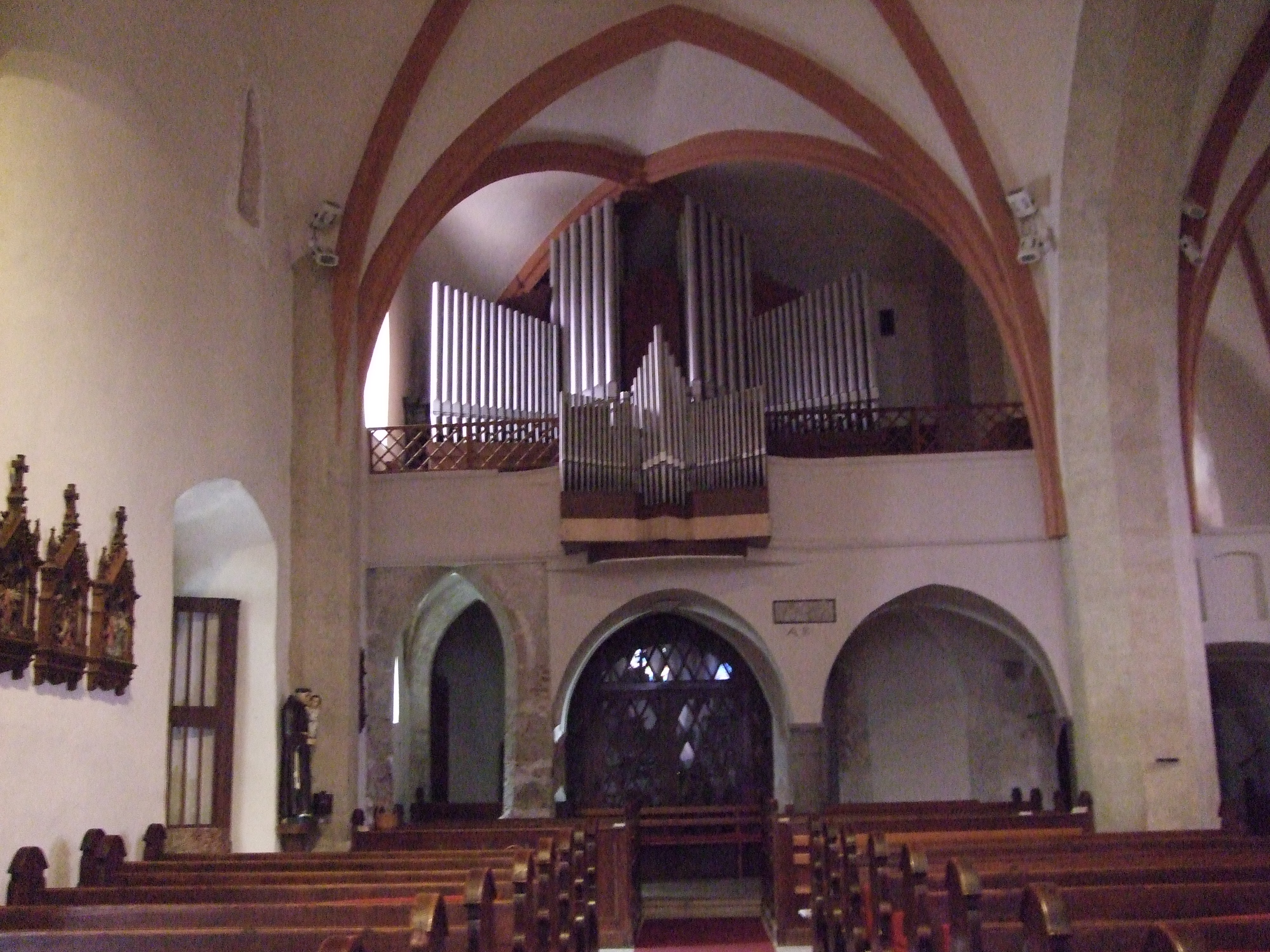 Stĺp vytvárajúci efekt halového dvojlodia, krížová klenba, empora a orgán v pozadí